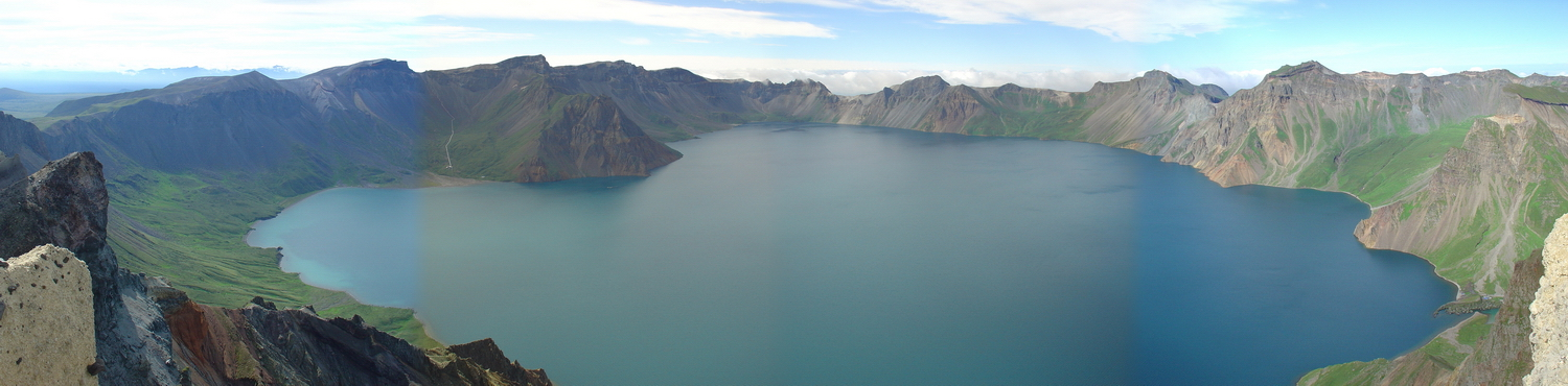 백두산천지 2006년 7월 23일